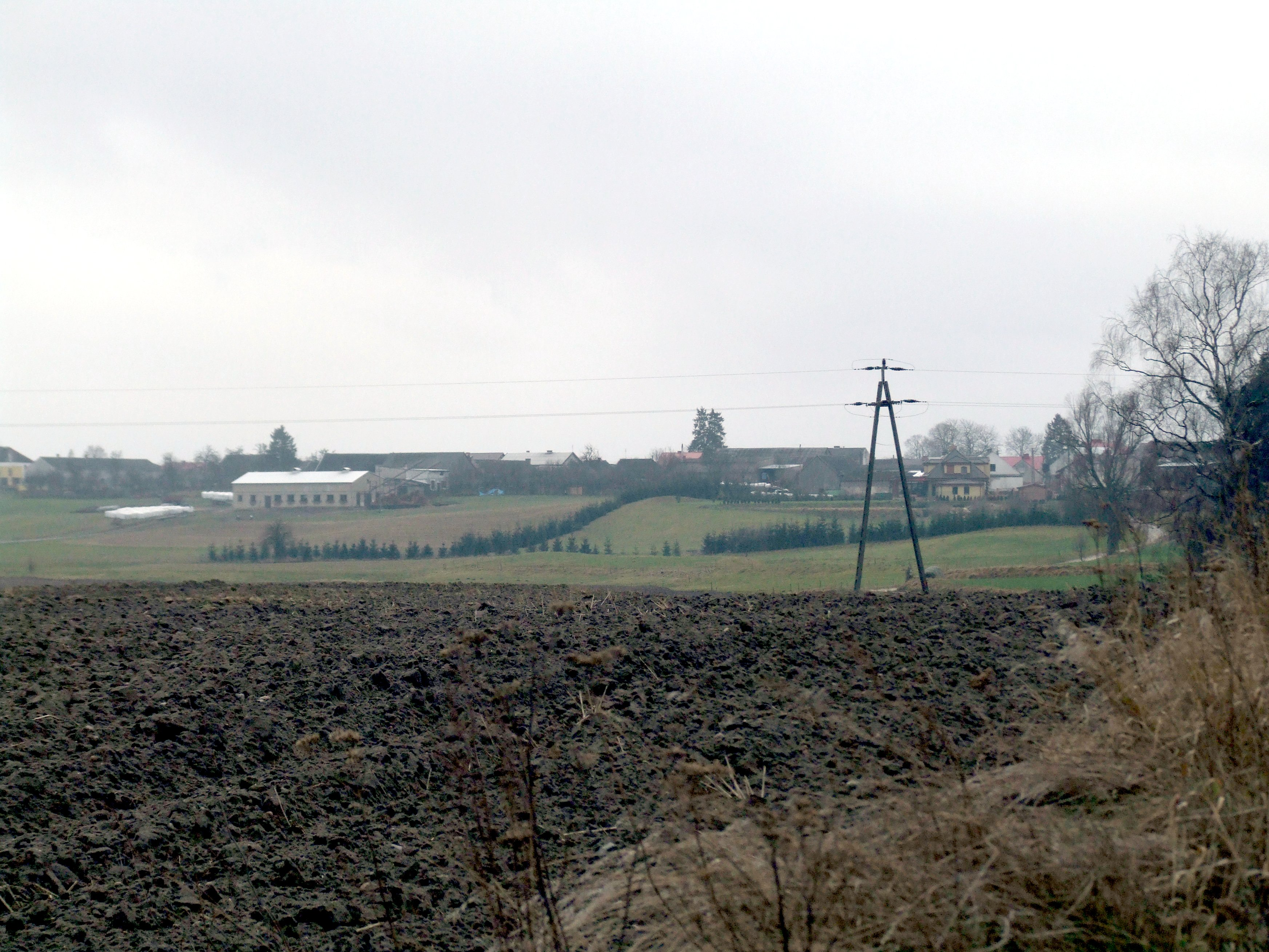 Górki (powiat kościerski)